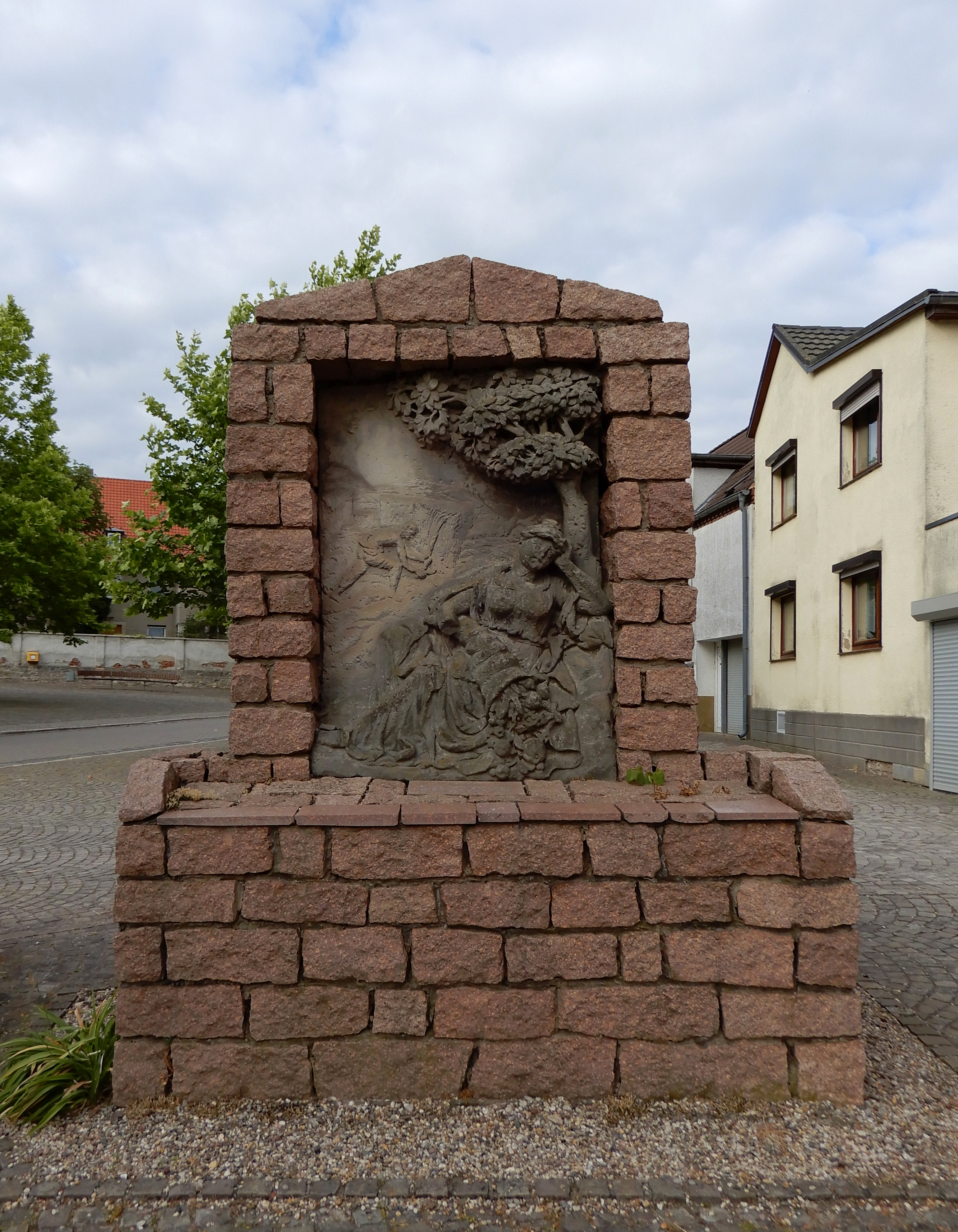 Denkmal Allegorie der Landwirtschaft